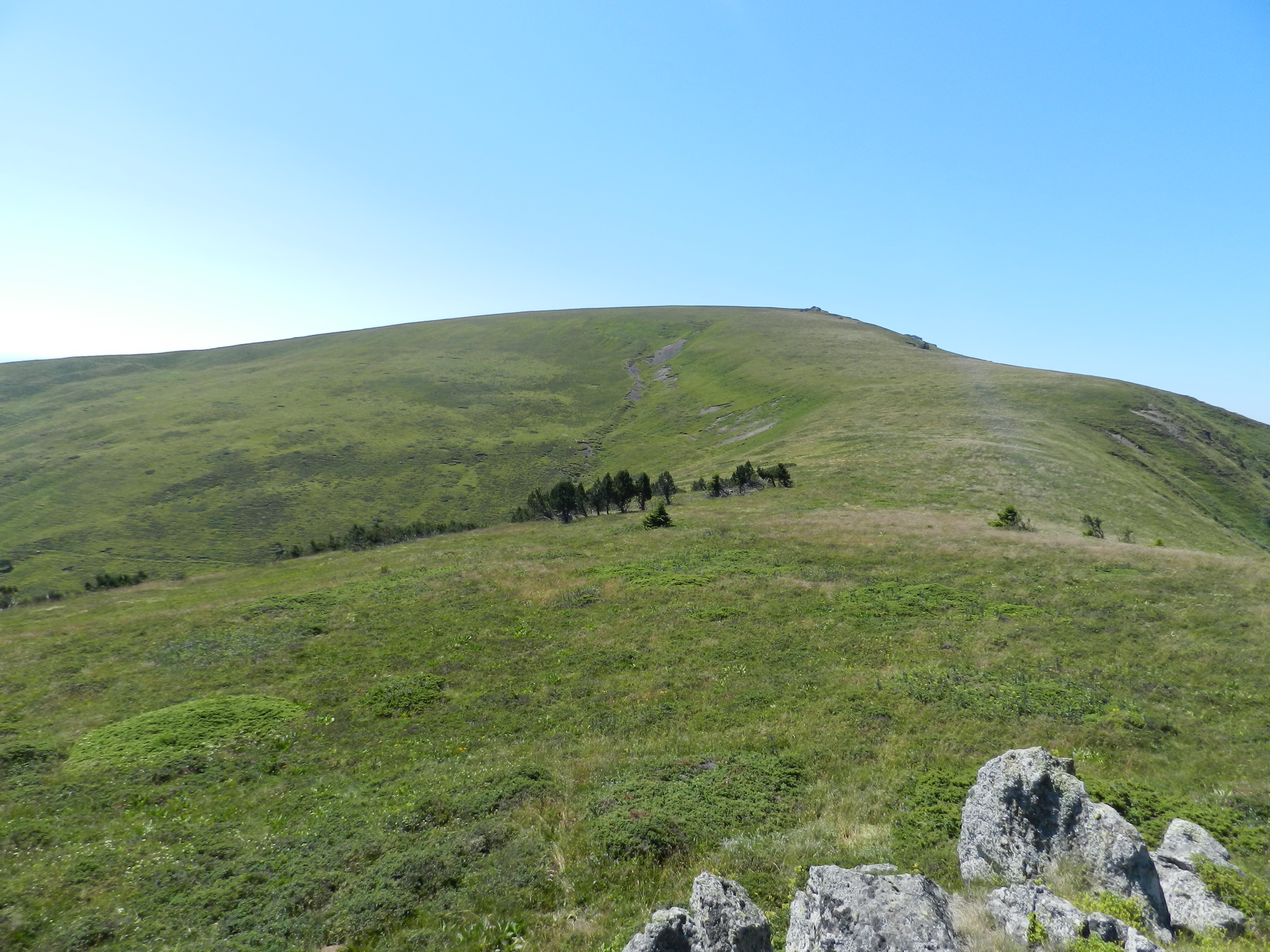 Le sommet arrondie, vu depuis la Peyre de l'Ourse, d'où le ruisseau de Chambeuil prend sa source